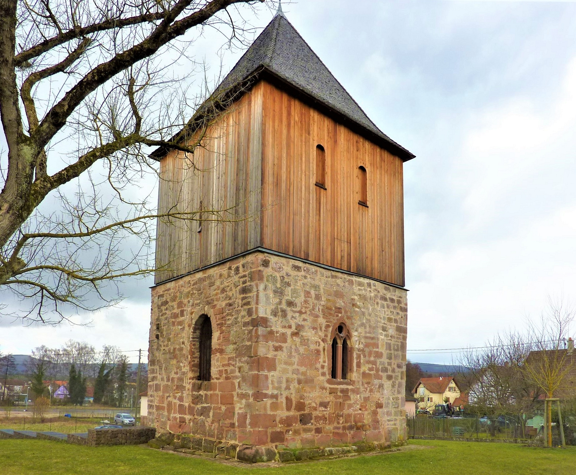 Ancienne église dite Altkirch (Reichshoffen)